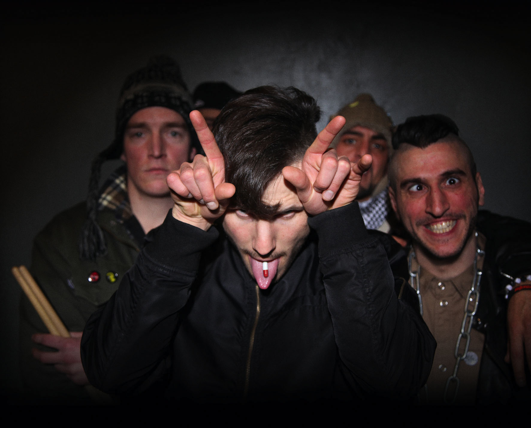 Swiss